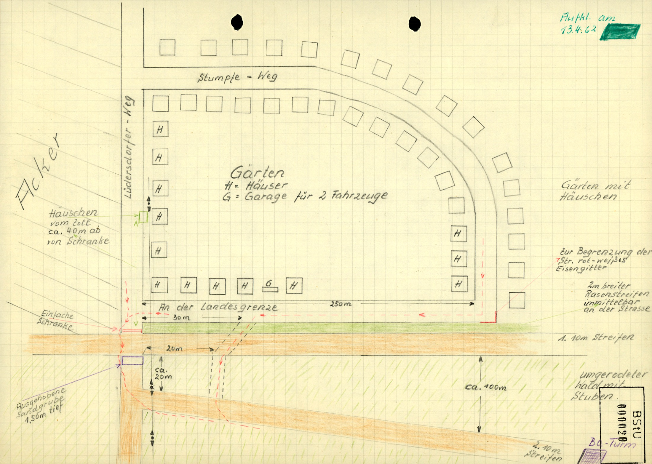 Operative Grenzschleuse bei Lübeck-Schlutup – Handskizze 1962. Archiv des BStU MfS HA-I Nr-2602 Bl-020